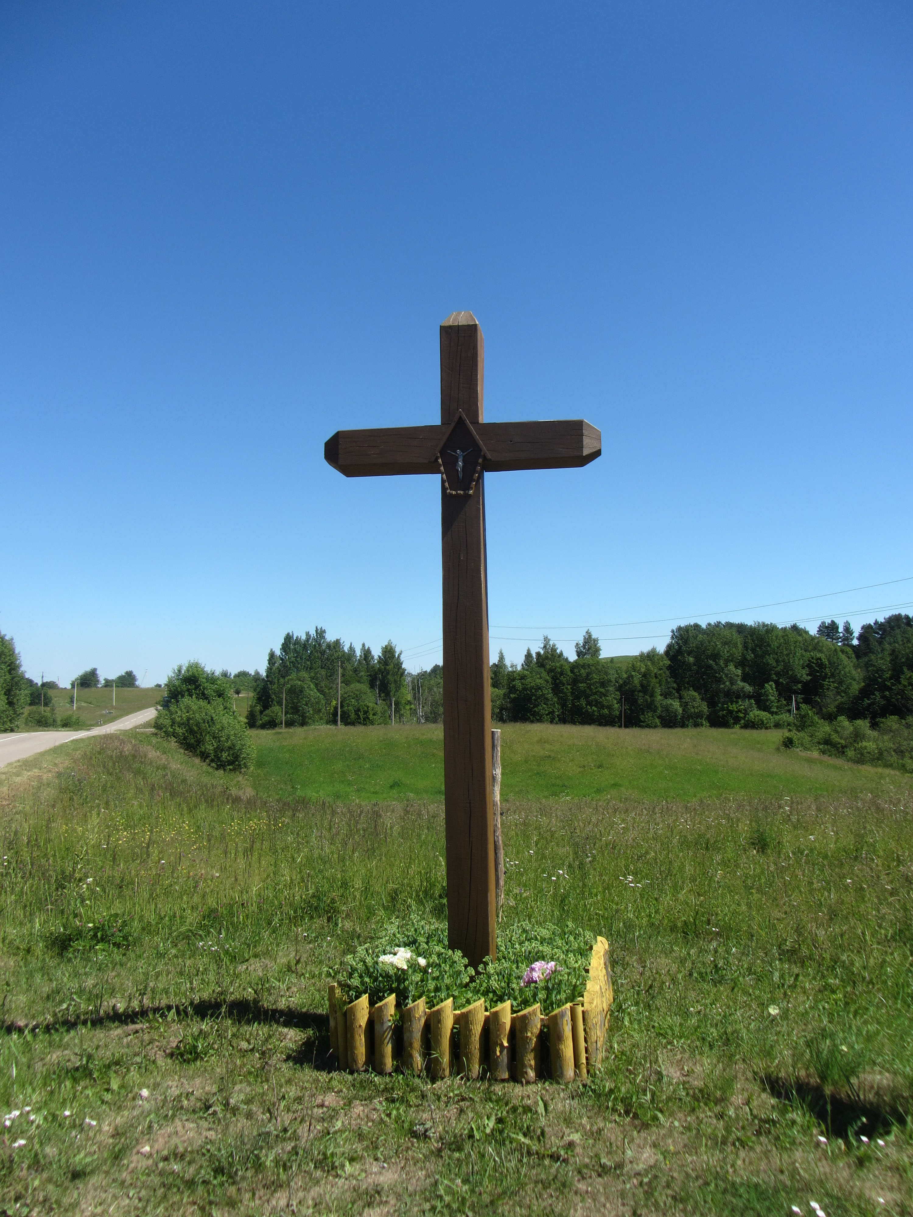 Pastrėvio sen., Lithuania